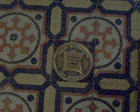 Iglesia de Tandil, Argentina